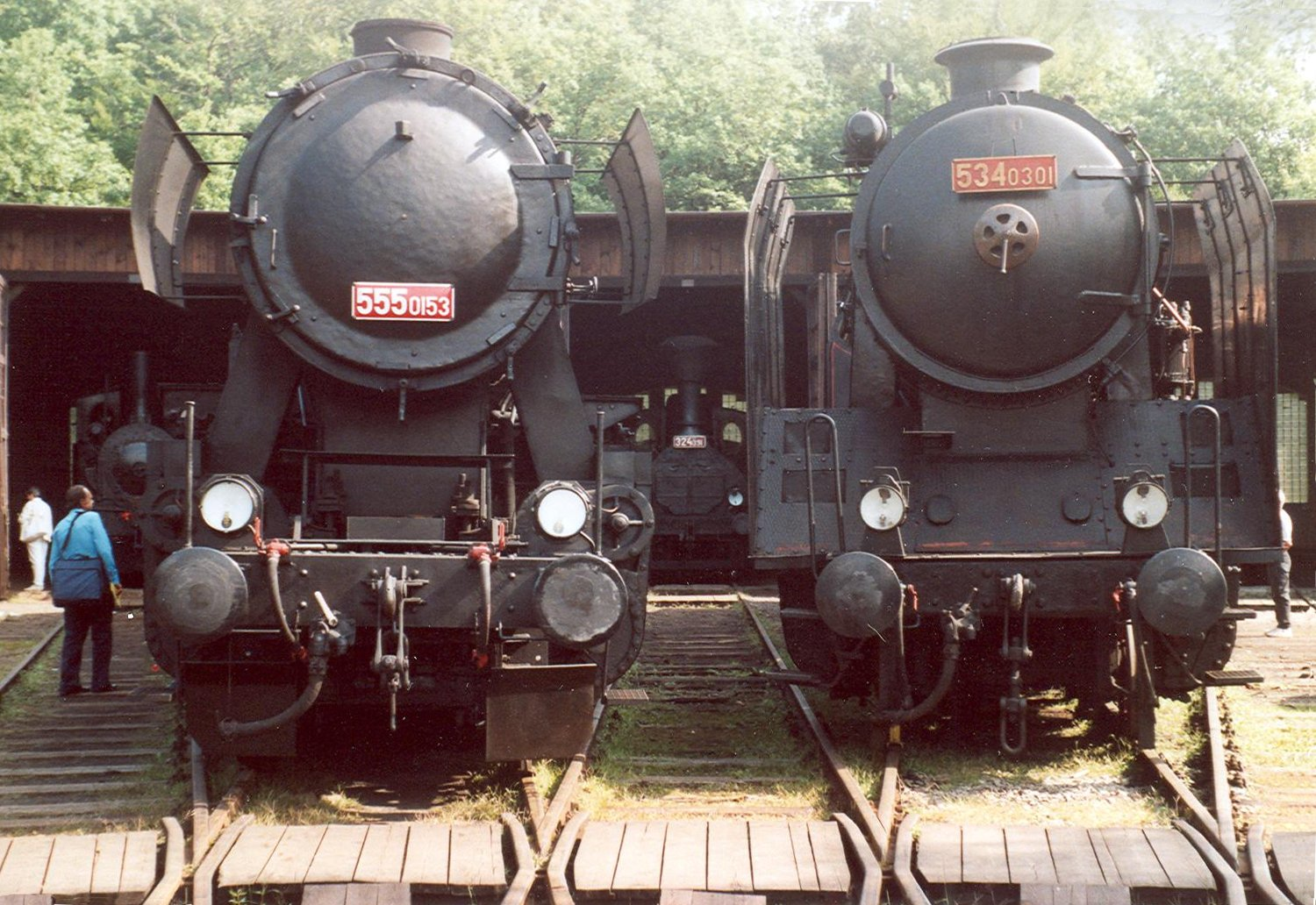 2 Güterzuglokomotiven und dazwischen die Außenrahmenlok 354.391